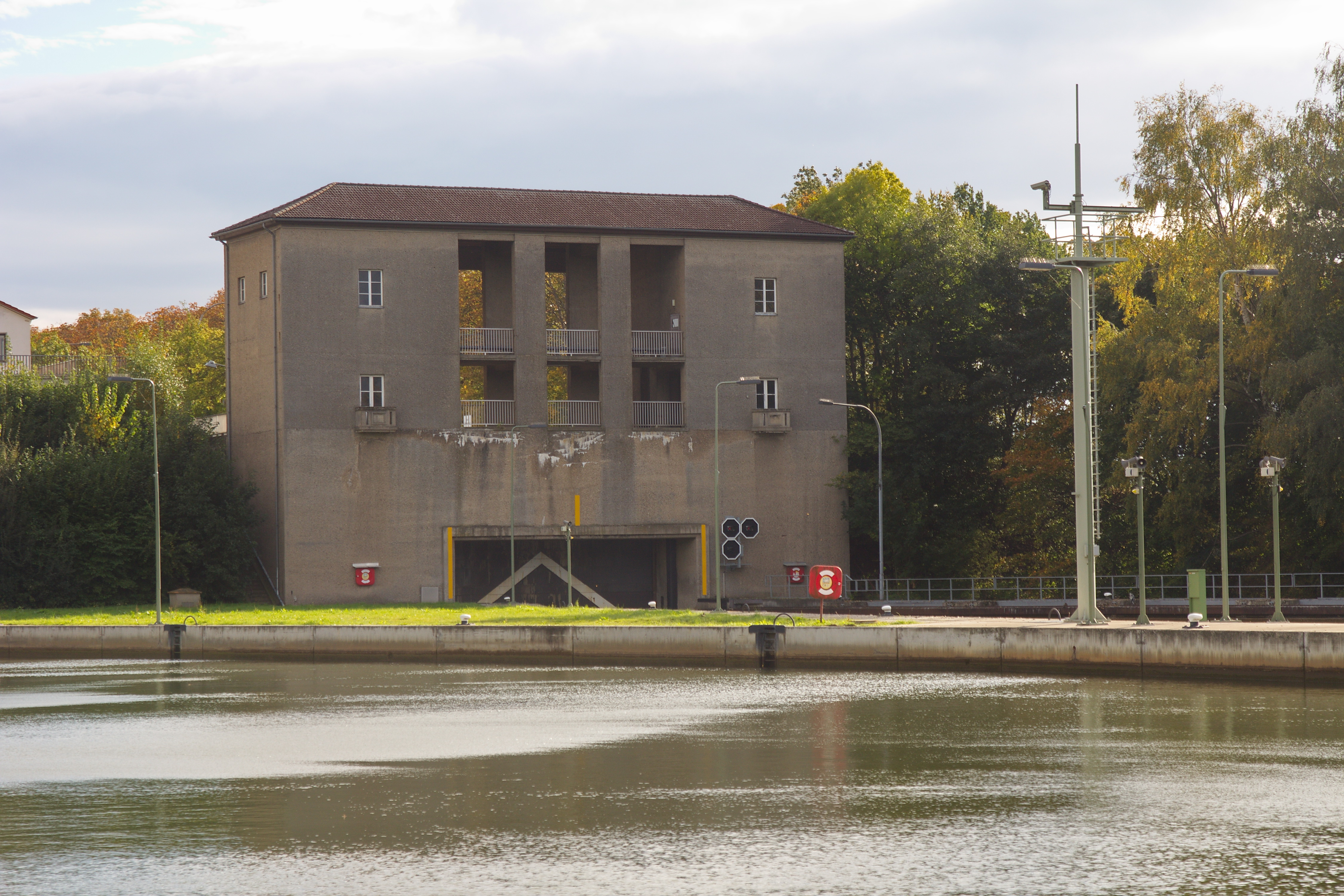 Die Schleuse Üfingen wurde als zweite Schleuse im Stichkanal Salzgitter mit der Schleuse Wedtlenstedt gebaut und offiziell am 2. Dezember 1940 in Betrieb genommen.